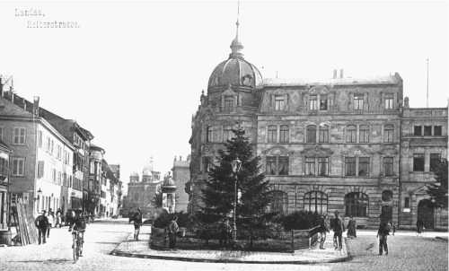 Landau in der Pfalz: Blick von der Reiterstraße in die Xylanderstraße, im Vordergrund Bankgebäude, früher Landauer Volksbank, heute Filiale Deutsche Bank